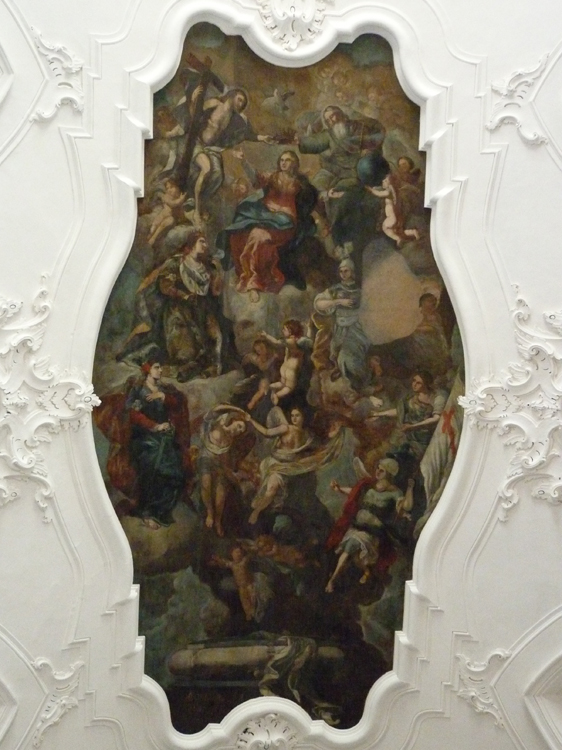 San Giovanni in Fiore - Chiesa della Madonna della Sanità, Affresco de "L'inconorazione di Maria"